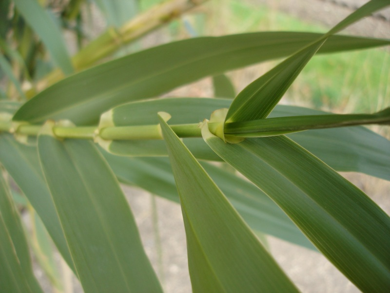 Arundo donax, 16 septembre 2004, Jardin des Plantes de Paris